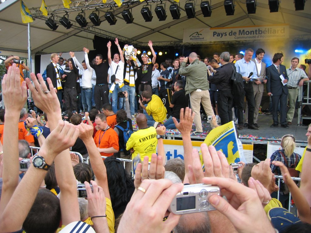 Retour éqauipe de Sochaux Coupe de France 2007 au Stade Bonale de Sochaux et supporters